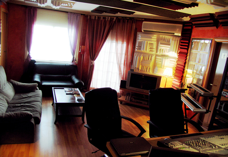 Estudio de grabación de Soma